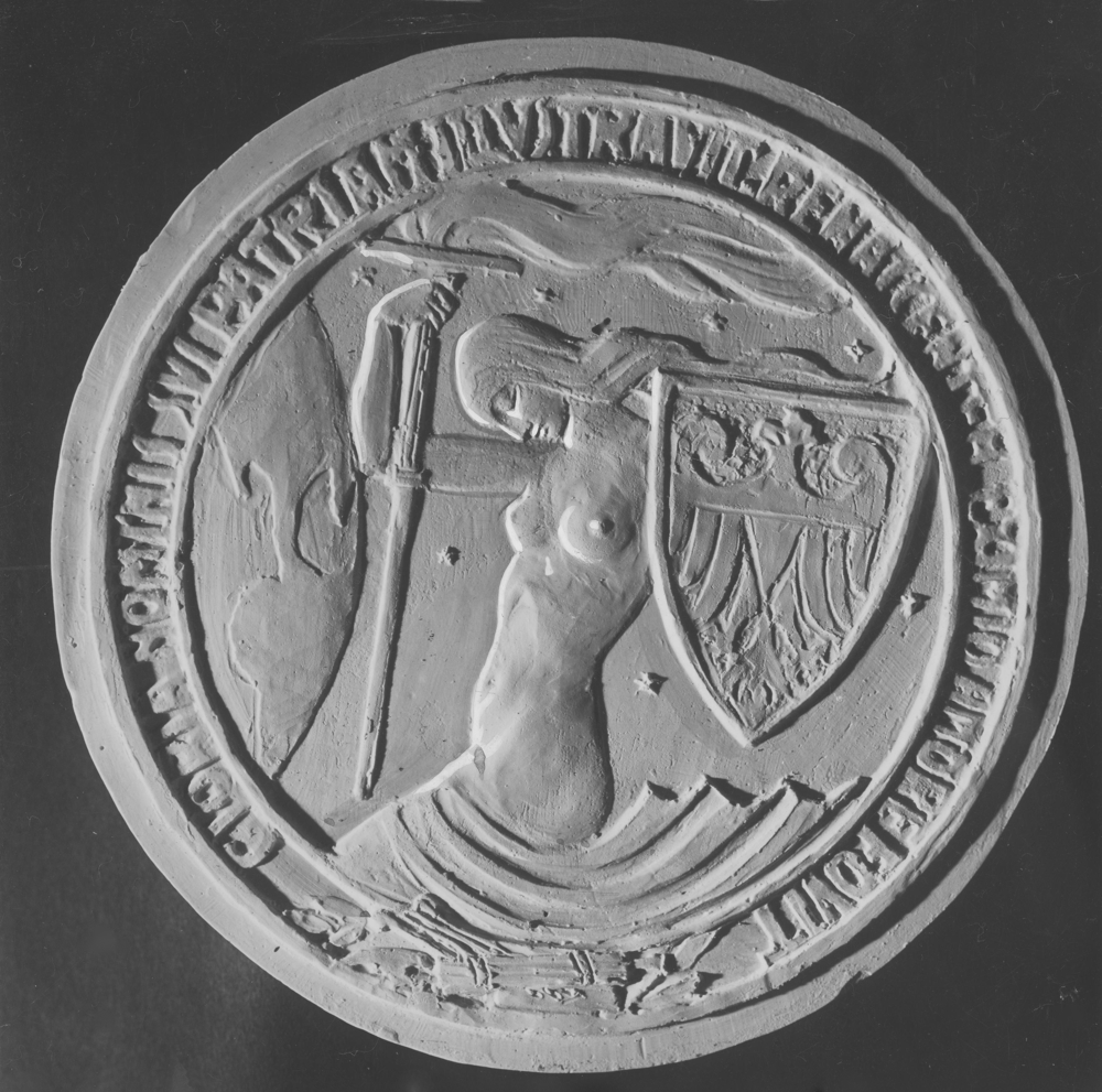 Jan Raszka - Rewers medalu ku czci Ignacego Jana Paderewskiego.